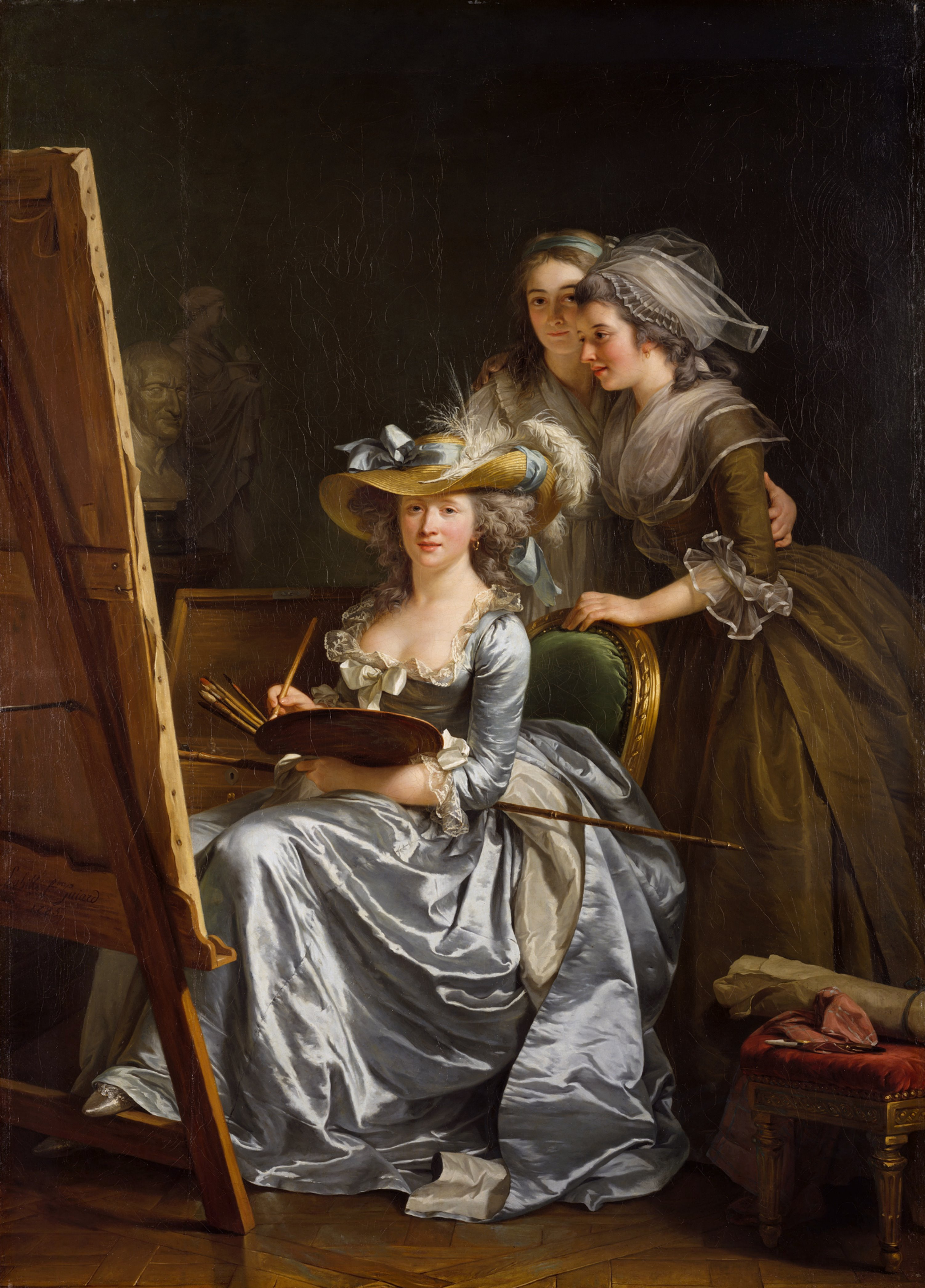 The pupils are Marie-Gabrielle Capet and Carreaux de Rosemond.